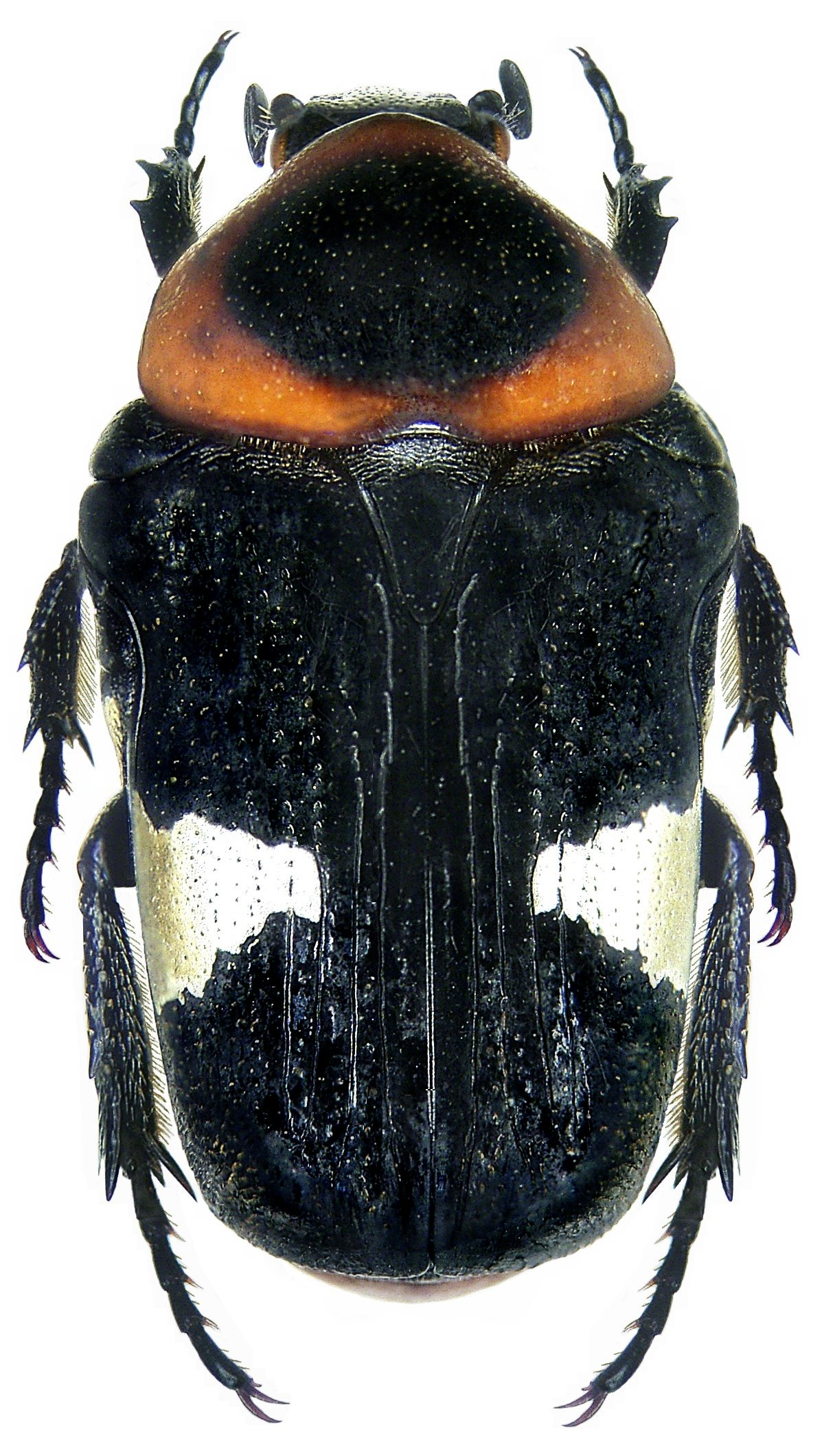 Familie: Scarabaeidae Grösse: 13,6-17,1 mm Verbreitung: Taiwan, Südchina, Vietnam, Laos, Thailand, Myanmar, Indien, Sri Lanka Fundort: Südchina, S-Yunnan, Jinghong leg. A.Weigel, 2008; det. U.Schmidt, 2008 Foto: U.Schmidt, 2008